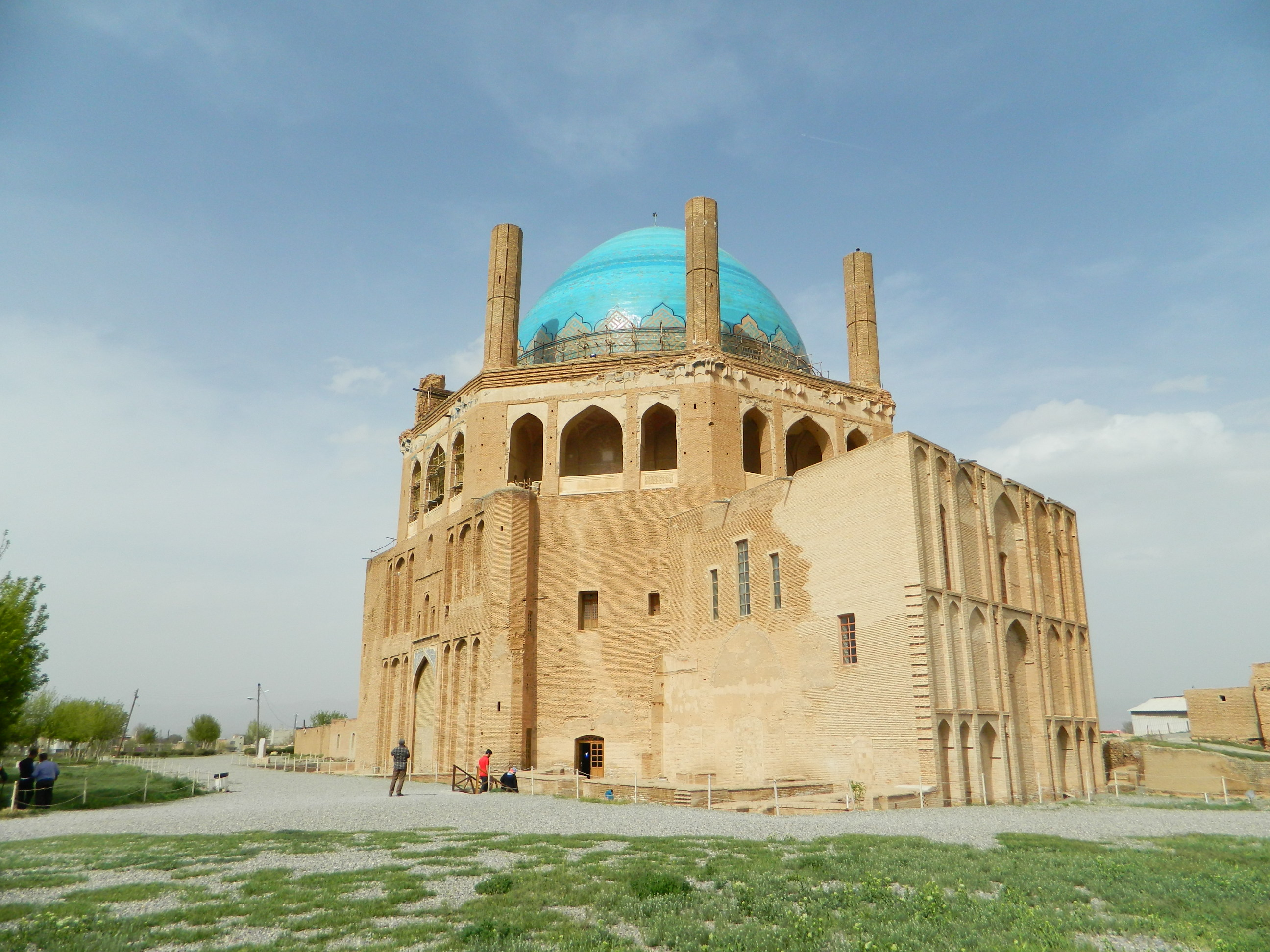 Общий вид мечети.